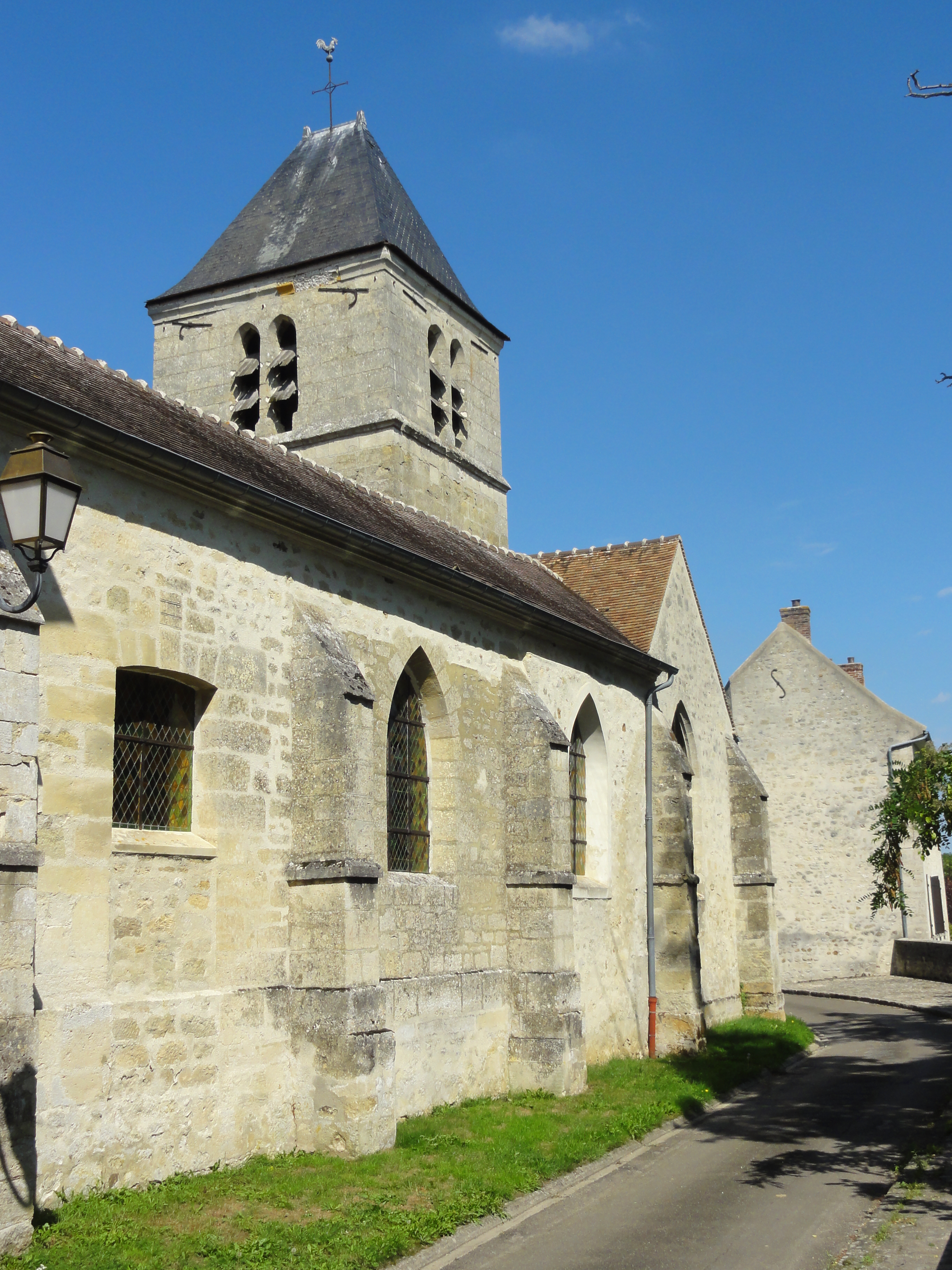 Église Sainte-Marie-Madeleine du Perchay - voir titre.